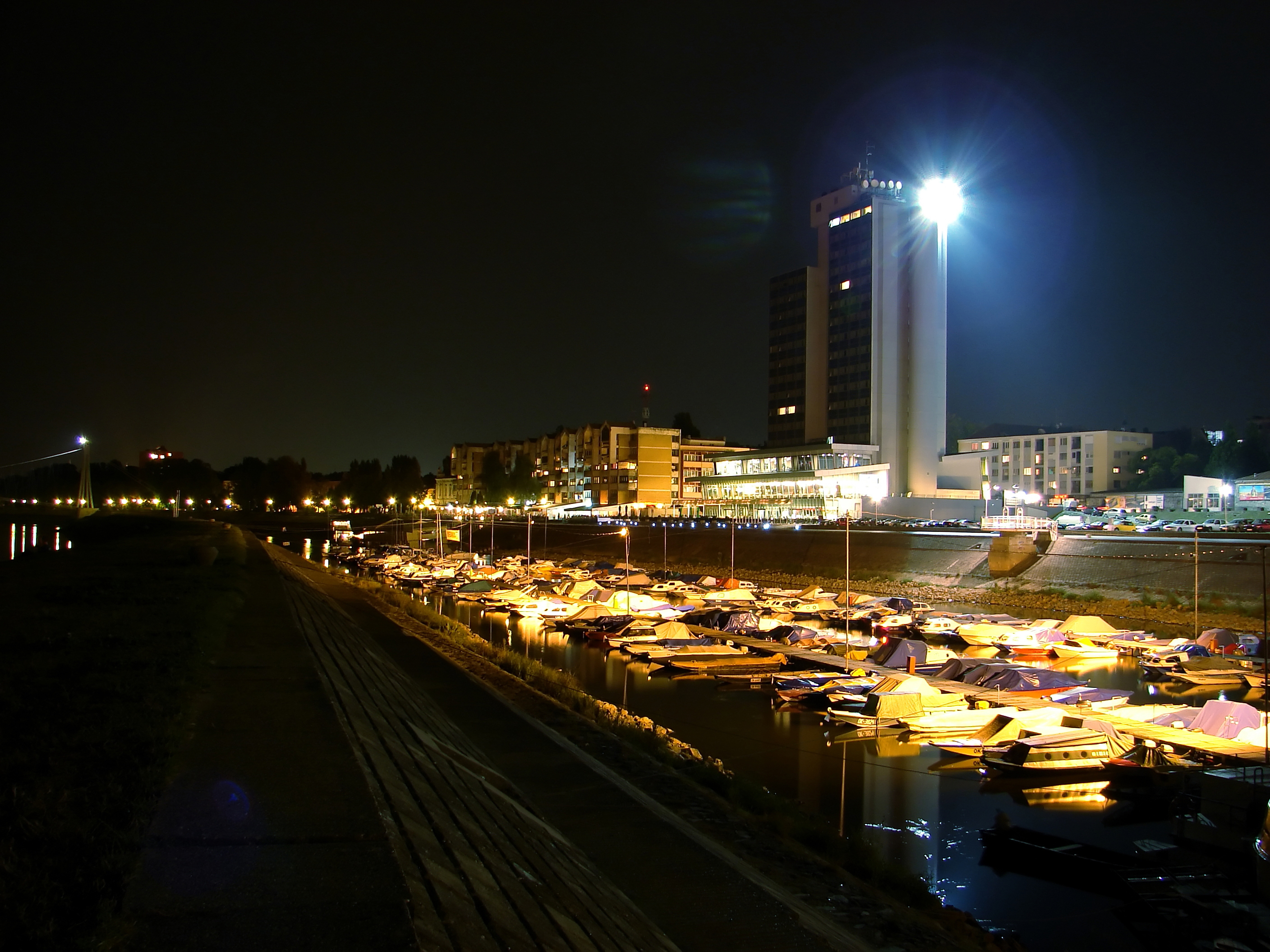 Osijek - Zimska Luka